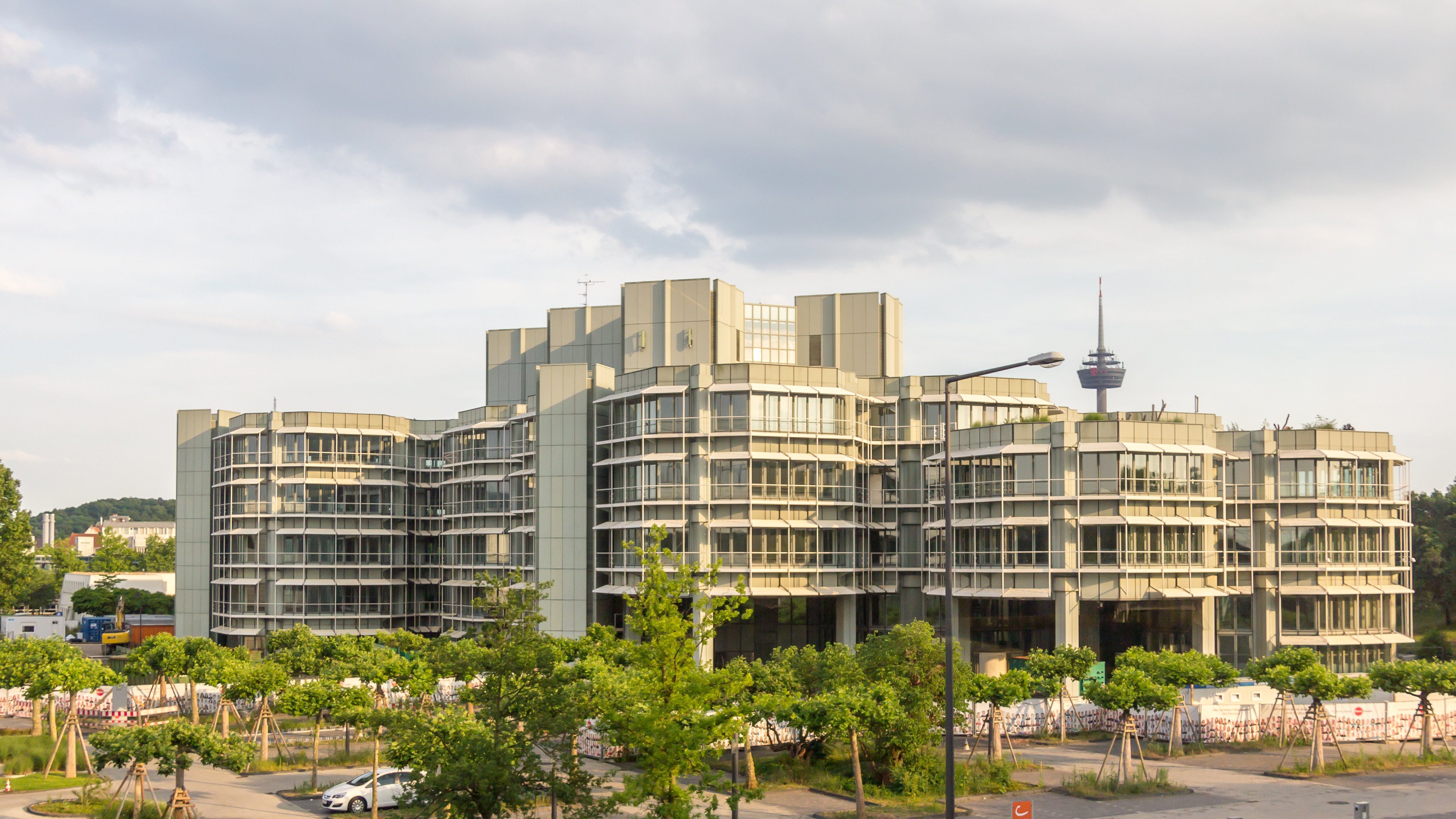 Alte Hauptverwaltung der Rheinenergie, Parkgürtel, Köln. Architekten: Kraemer, Sieverts & Partner. Bauzeit: 1978-80. Das Gebäude wird seit dem Frühjahr 2015 für den Abriss vorbereitet